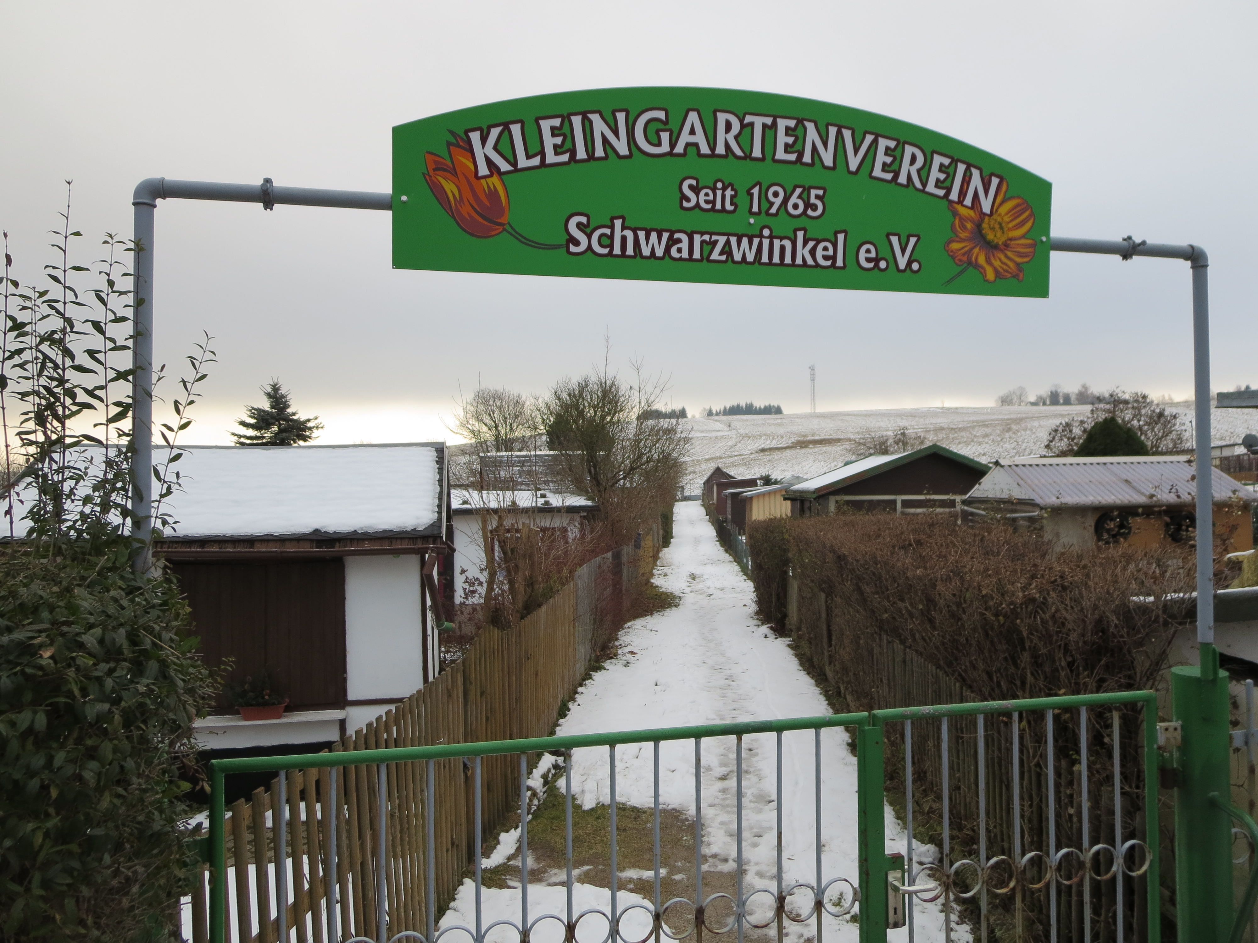 Schönheide im Erzgebirge, Ortsteil Schwarzwinkel: Kleingartenanlage an der Schneeberger Straße, 1965 entstanden auf einem in den 1940/1950er Jahren mit Hausmüll verfüllten Teil des Tales.